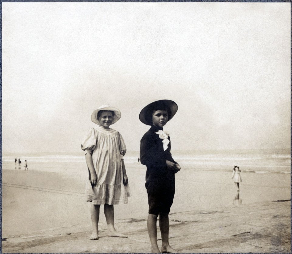 Anna Iwaszkiewicz z kuzynem Stanisławem Pilawitz w Heyst-sur-Mer, 1907